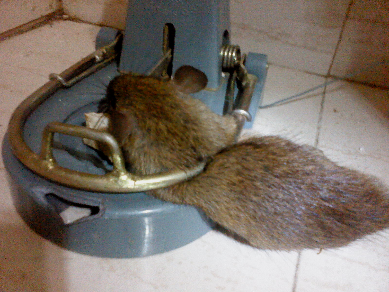 എലി എലിക്കെണിയിൽ